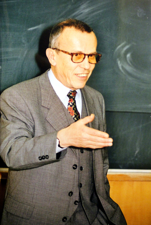 Portrait Prof. Klaus-Jürgen-Richter